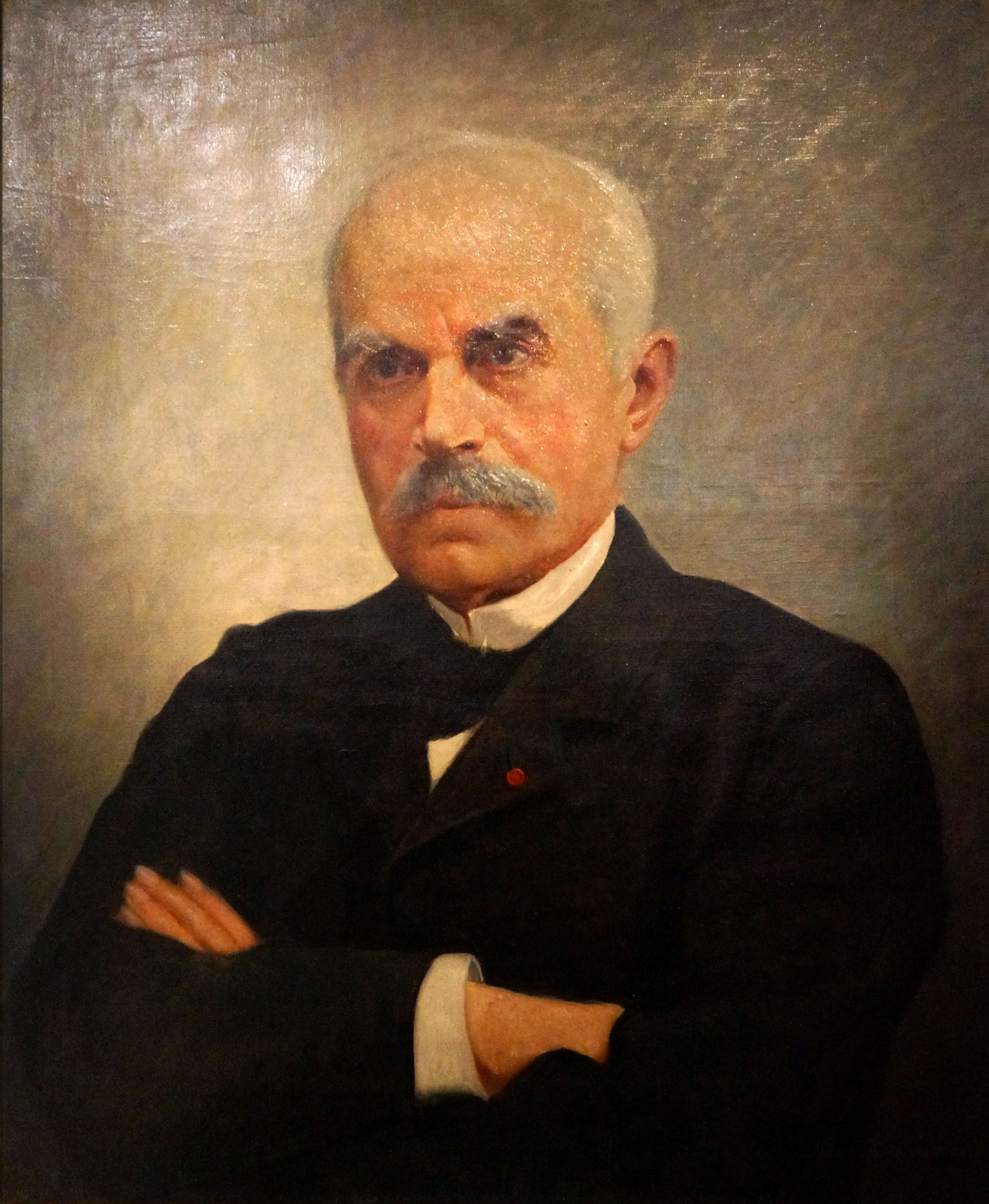 Charles Le Myre de VilersI, huile sur toile de Mascré souville, musée du quai branly. 1933.